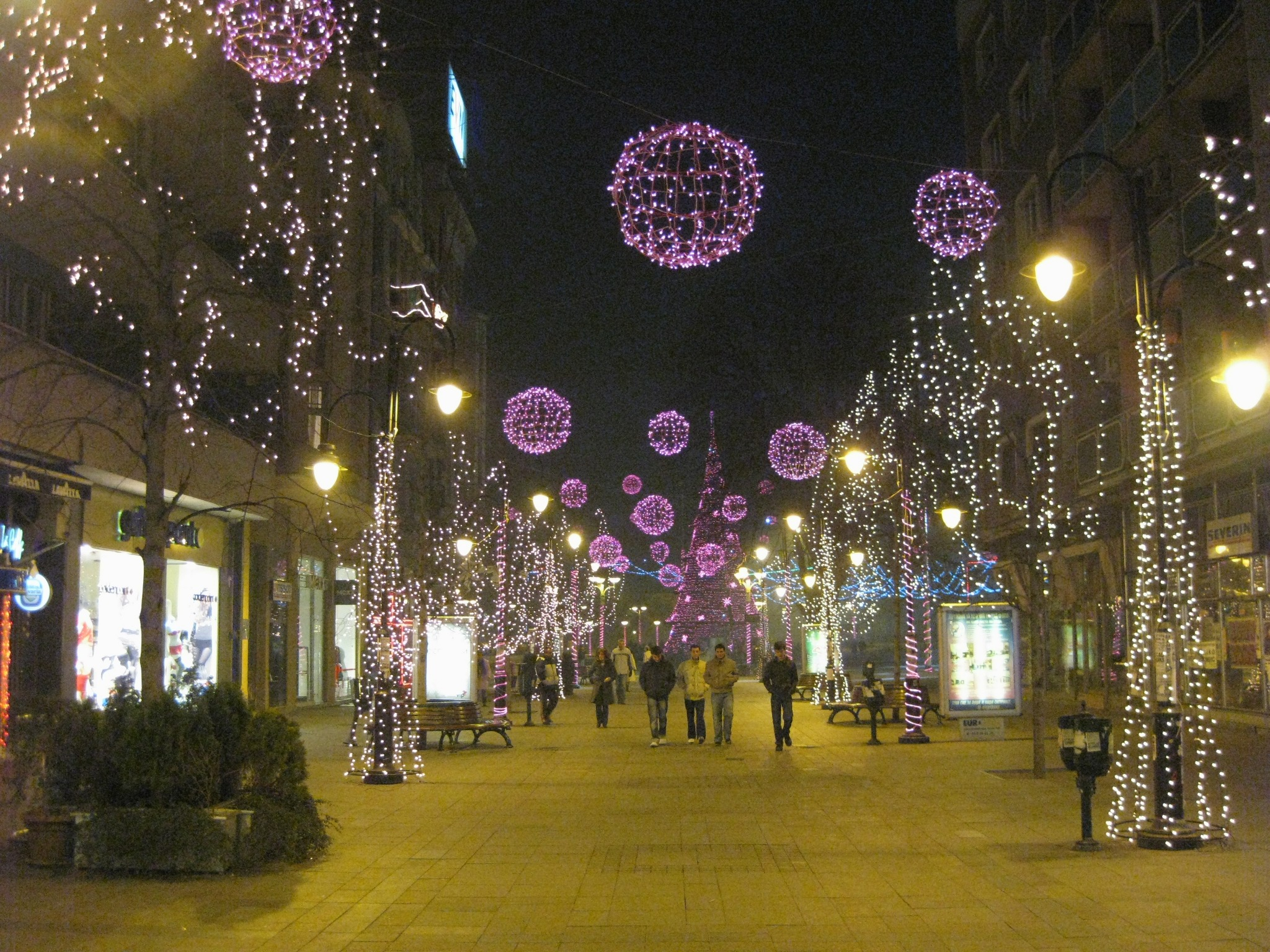 Skopje, Macedonia